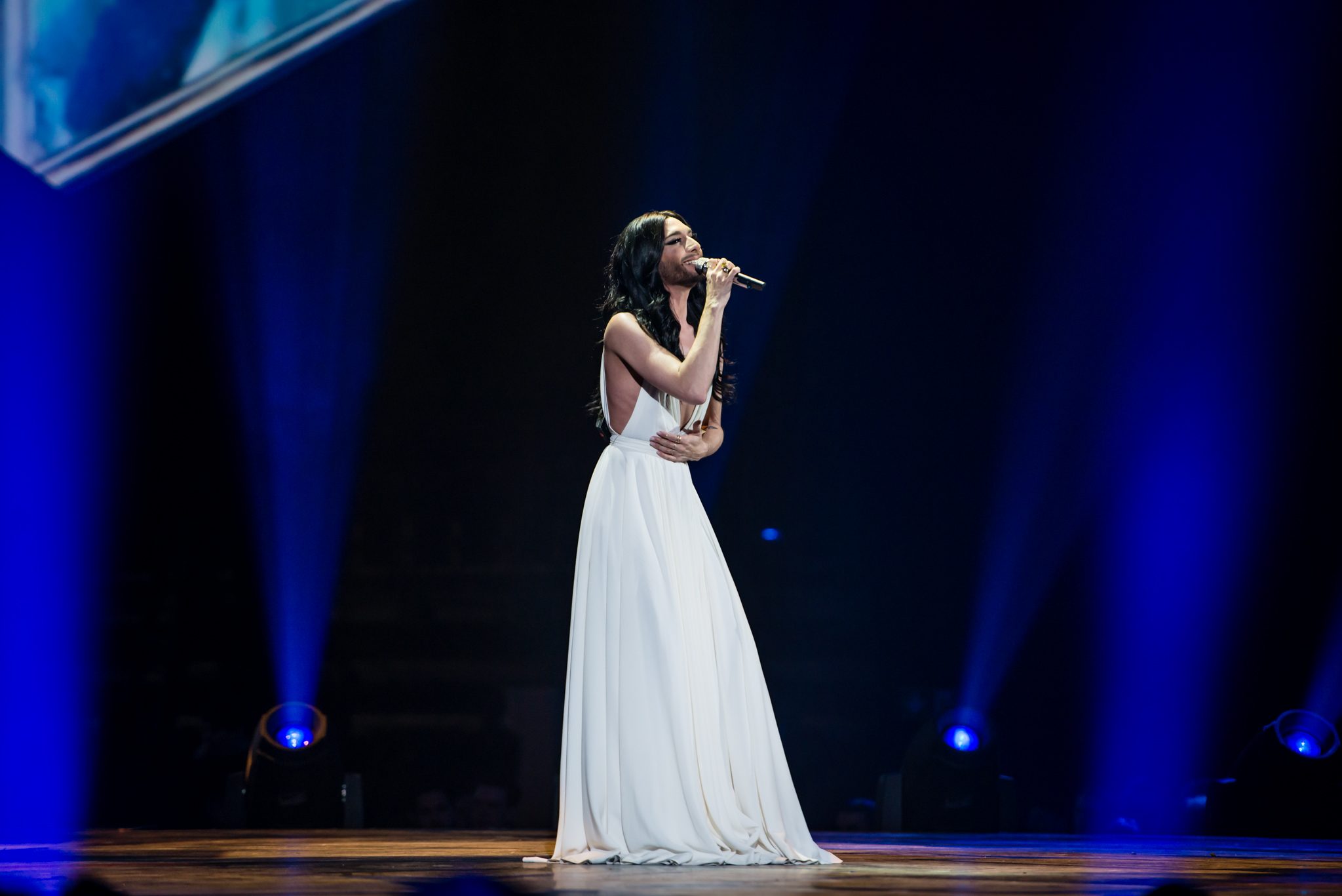 'Eurovision Song Contest 2015 - Unser Song für Österreich Live Show': 'Conchita Wurst'